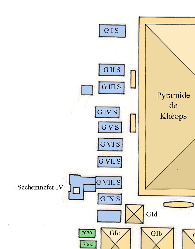 Carte du cimetière sud de la nécropole de Gizeh